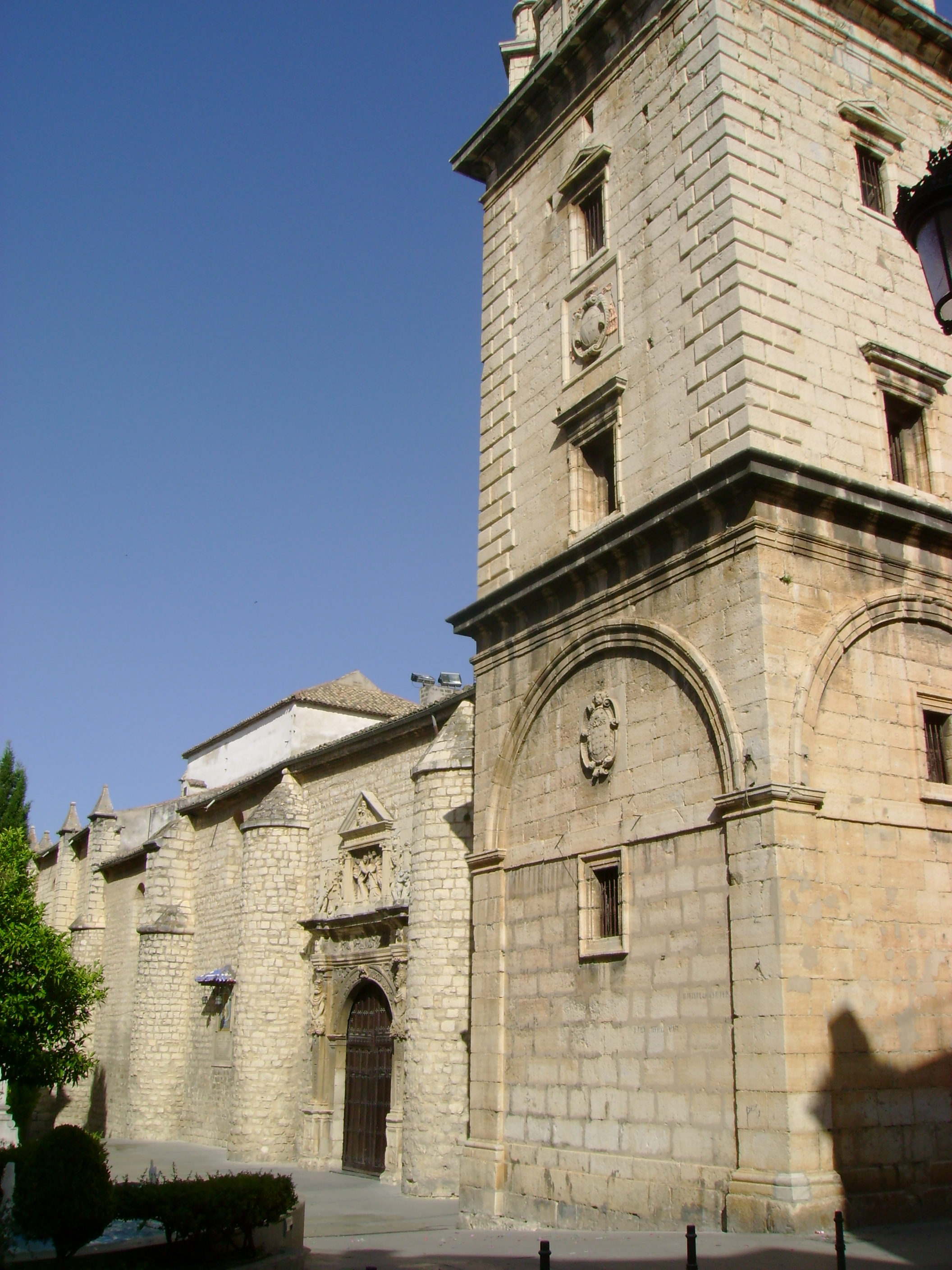 Fachada Norte de la Iglesia de San Ildefonso de Jaén.